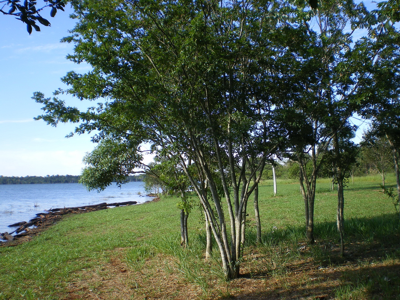 Fotos de los refugios y reservas de Itaipu, tomadas en los años 2007 y 2008 por mí